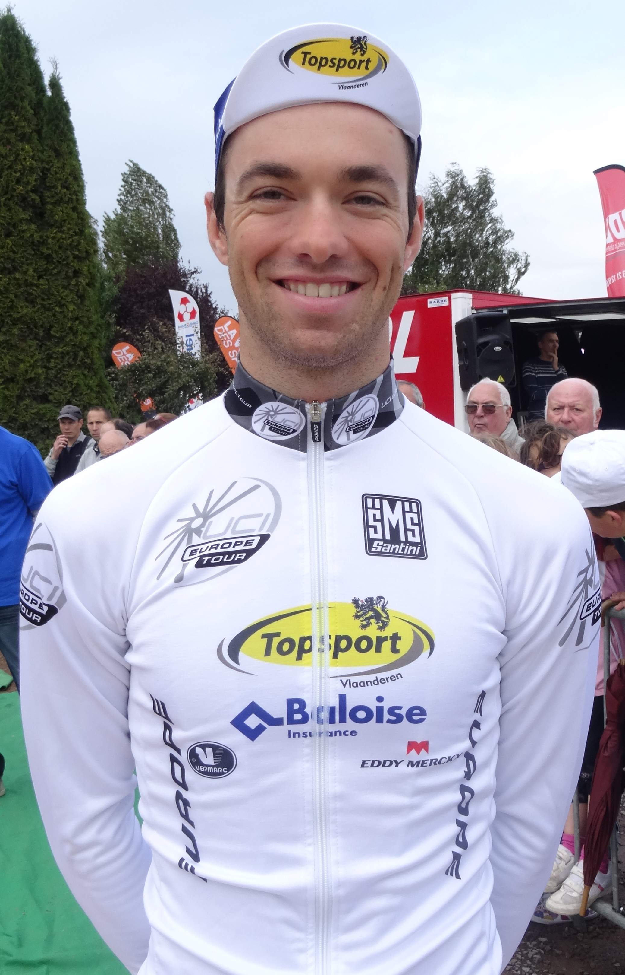 Reportage réalisé le dimanche 21 septembre à l'occasion du départ et de l'arrivée du Grand Prix d'Isbergues 2014 à Isbergues, Nord-Pas-de-Calais, France.